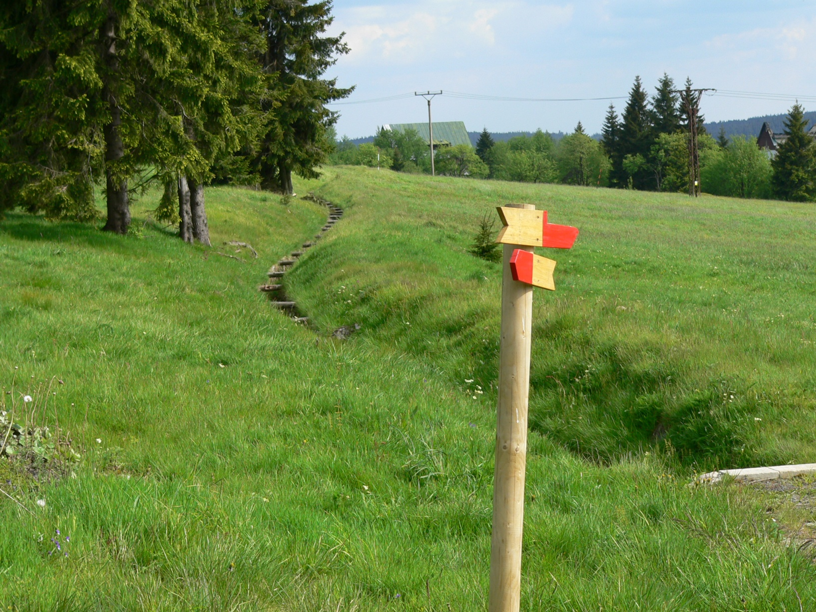 Blatenský vodní příkop u Horní Blatné